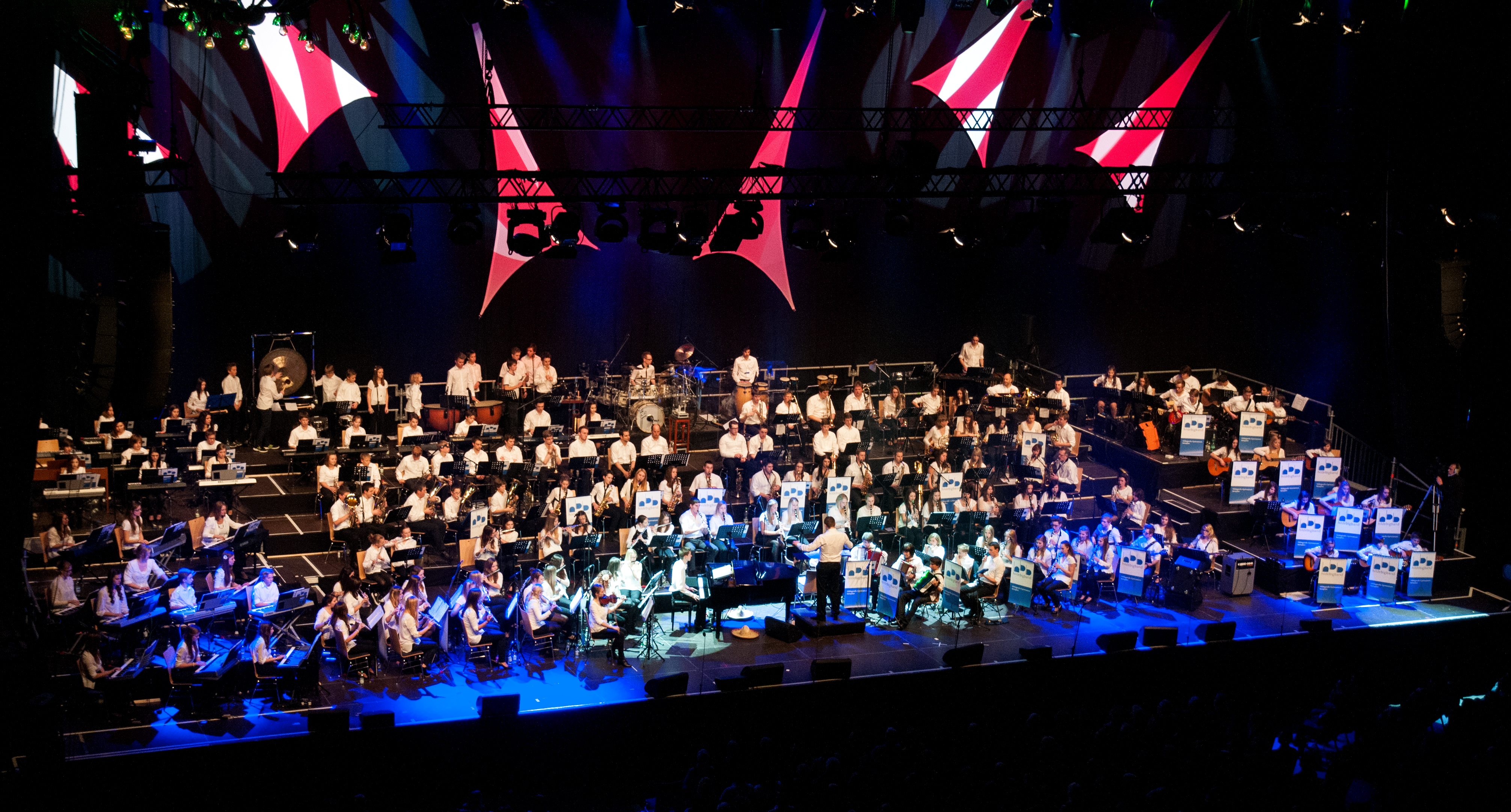 Die Hilde-Bigband in der BigBox Allgäu